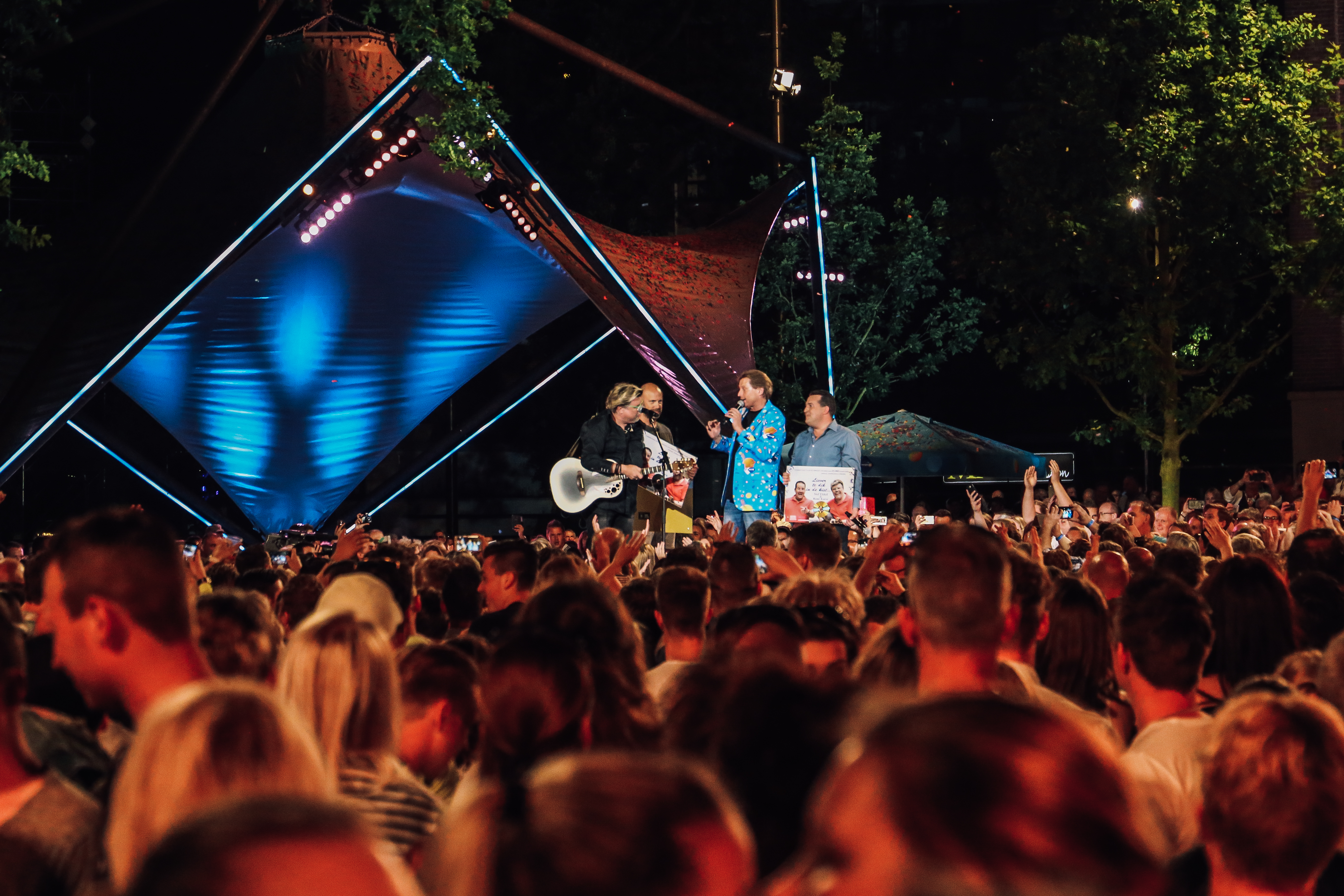 René Karst en Stef Ekkel ontvangen een gouden plaat voor het nummer 'Liever te dik in de kist' tijdens het Muziekfeest op het Plein: Emmen